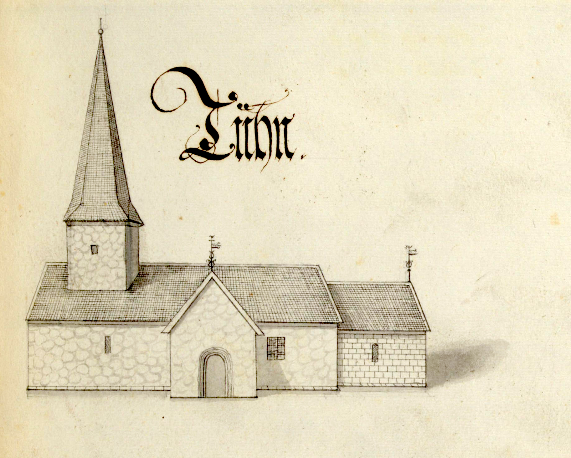 Tuns kyrka. Kyrka, äldre, teckning ur Peringskiölds Monumenta, avfotograferad i färg.